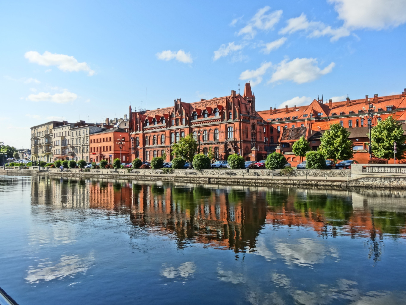 Północne nabrzeże Brdy w centrum Bydgoszczy - bulwar im. Zbigniewa Urbanyi